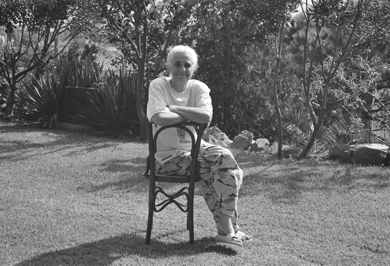 Imatge de Madola (Maria dels Àngels Domingo Laplana) el 1992.